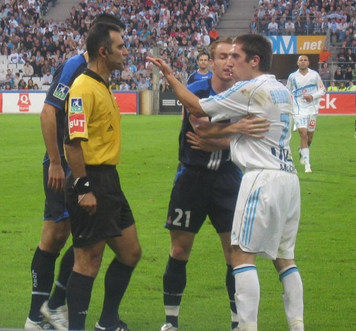 Match OM-LOSC 29 octobre 2005 - Altercation entre Franck Ribéry et l'arbitre